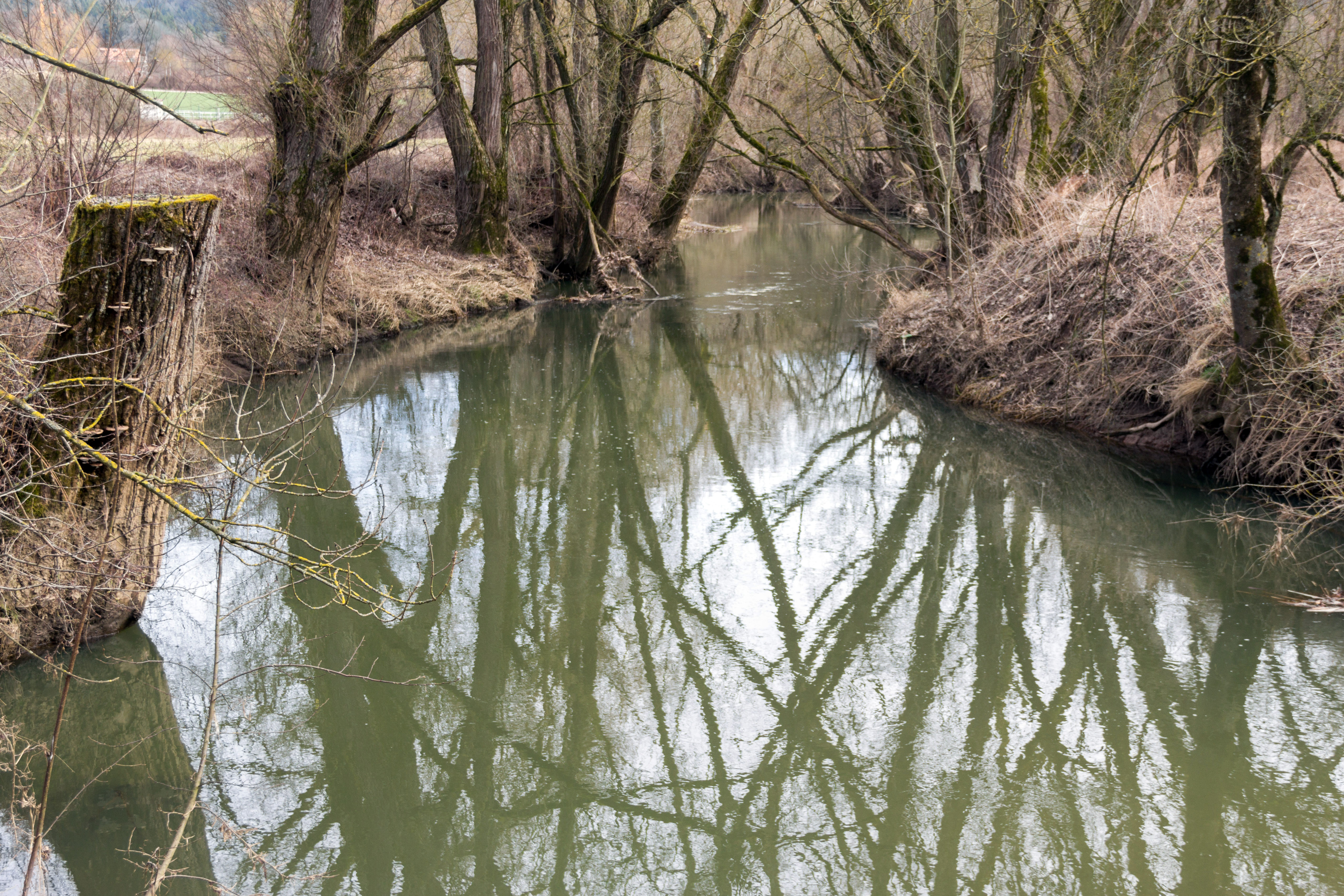 Schwarzach bei Greding, FFH Trauf der südlichen Frankenalb